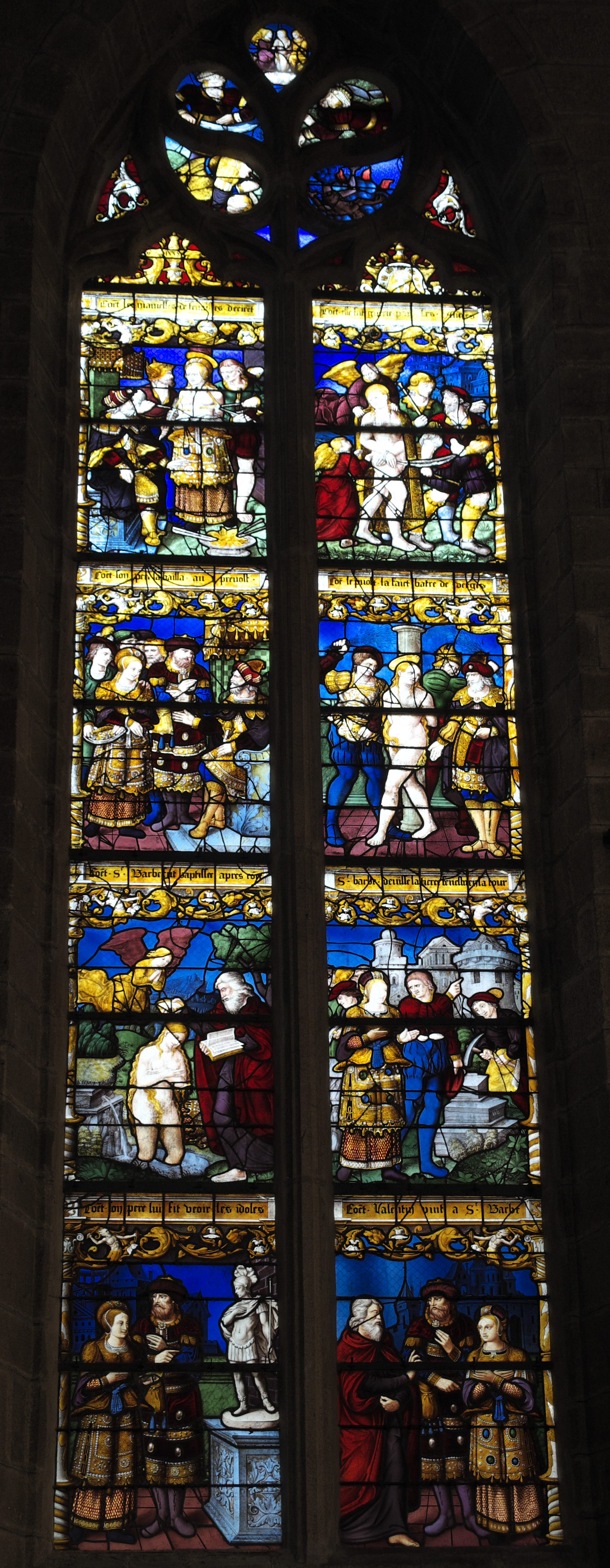 Barbarafenster (baie 5) in der katholischen Pfarrkirche St-Mathurin in Moncontour im Département Côtes-d’Armor (Region Bretagne/Frankreich), Bleiglasfenster von 1538